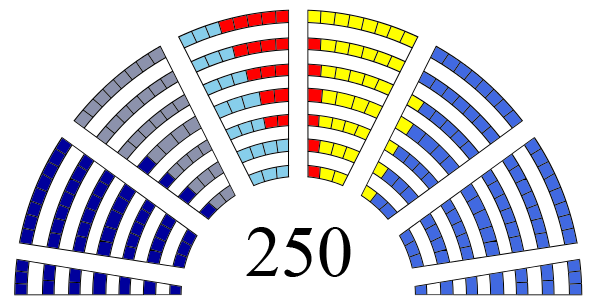 Parlamentarni izbori 2003 - raspodela mandata